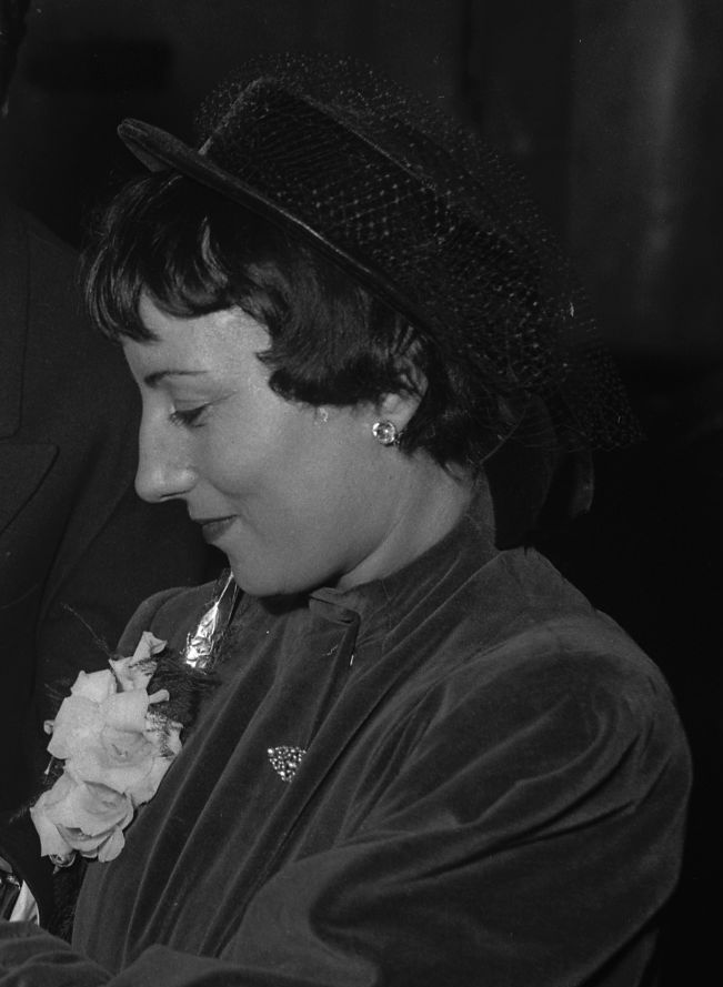 Basilique de Saint-Sernin. 4 Septembre 1952. Vue de Simone Turck et de Jo Bernardo dans la basilique pour l'échange des alliances.